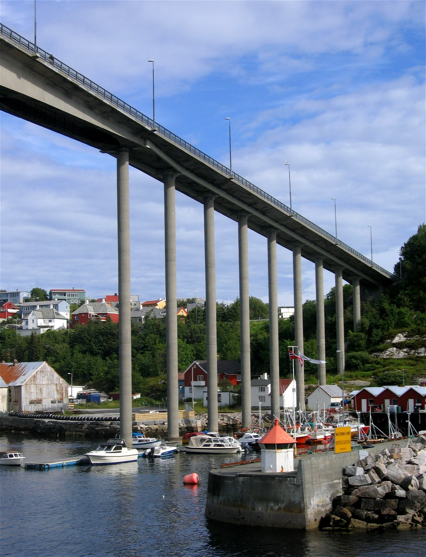 Brücke in Kristiansund, Norwegen